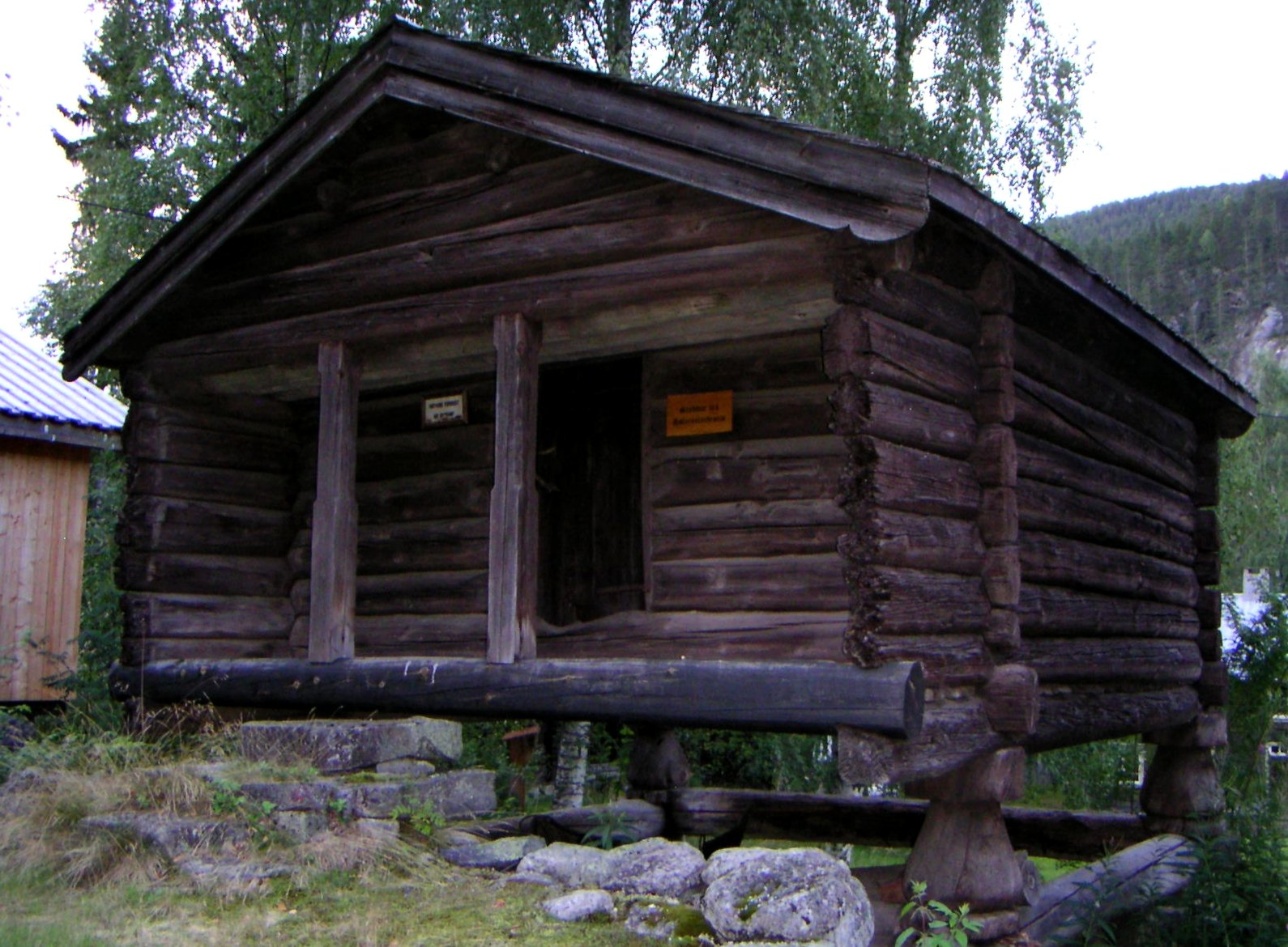 Bagn bygdetun